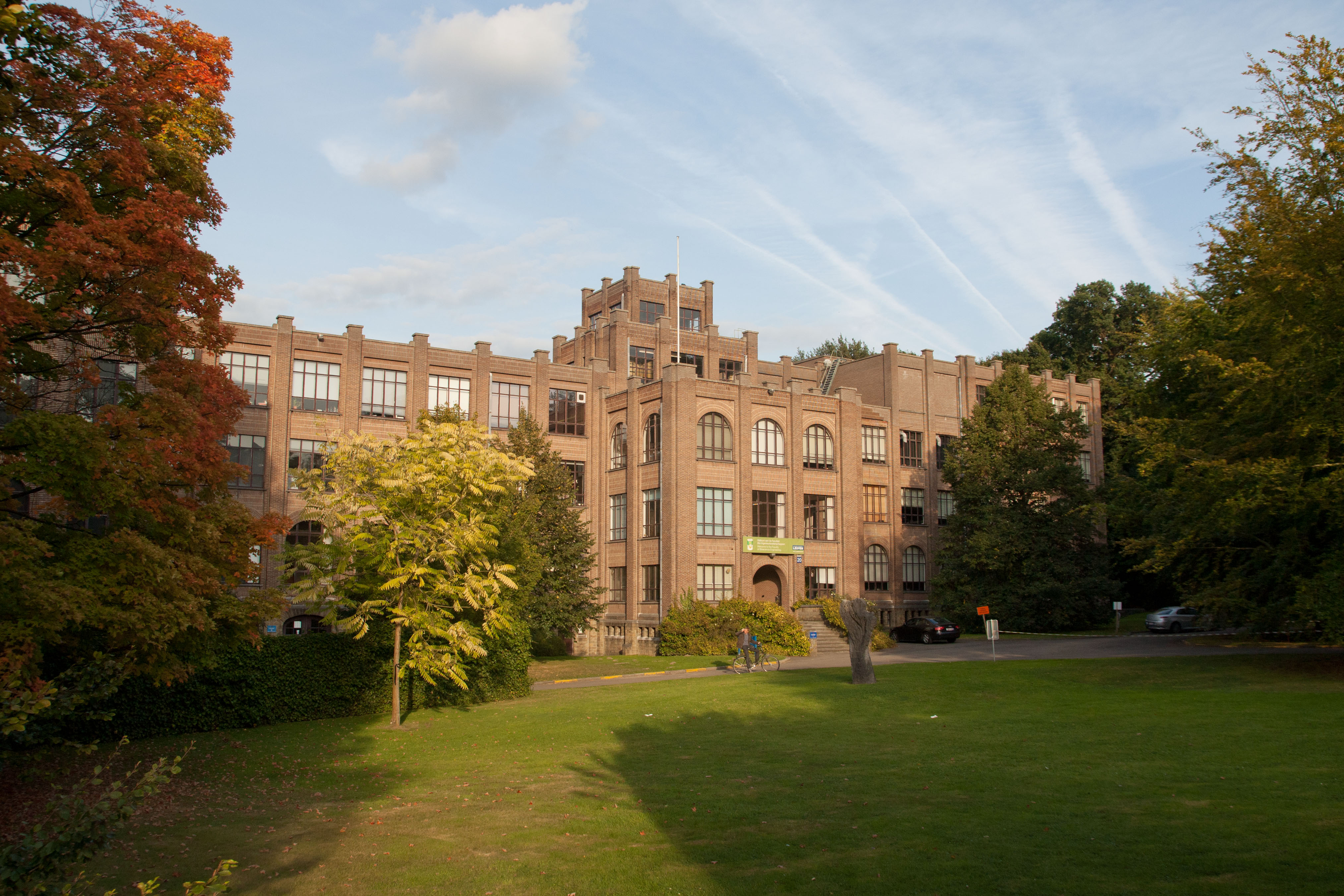 Landbouwinstituut, Kasteelpark Arenberg, Heverlee